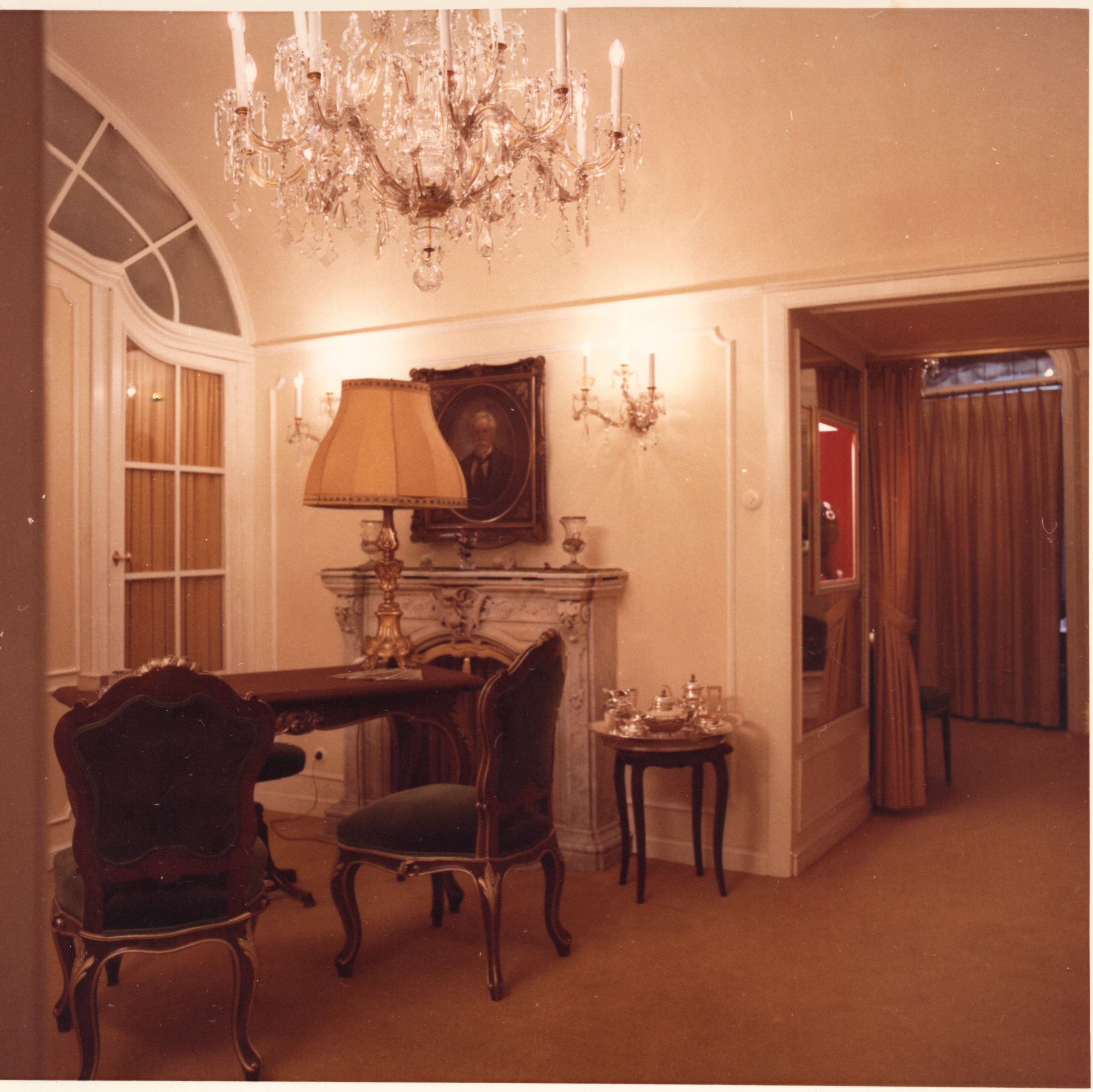 Juwelier Julius Hügler an der Freisingergasse in Wien I.